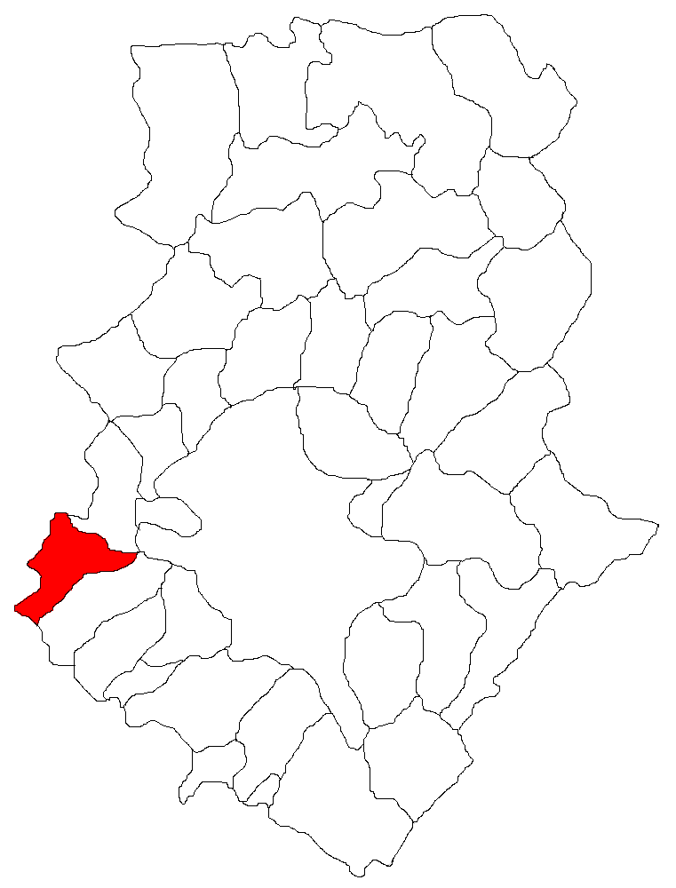 Categorie:Hărţi ale judeţului Ilfov